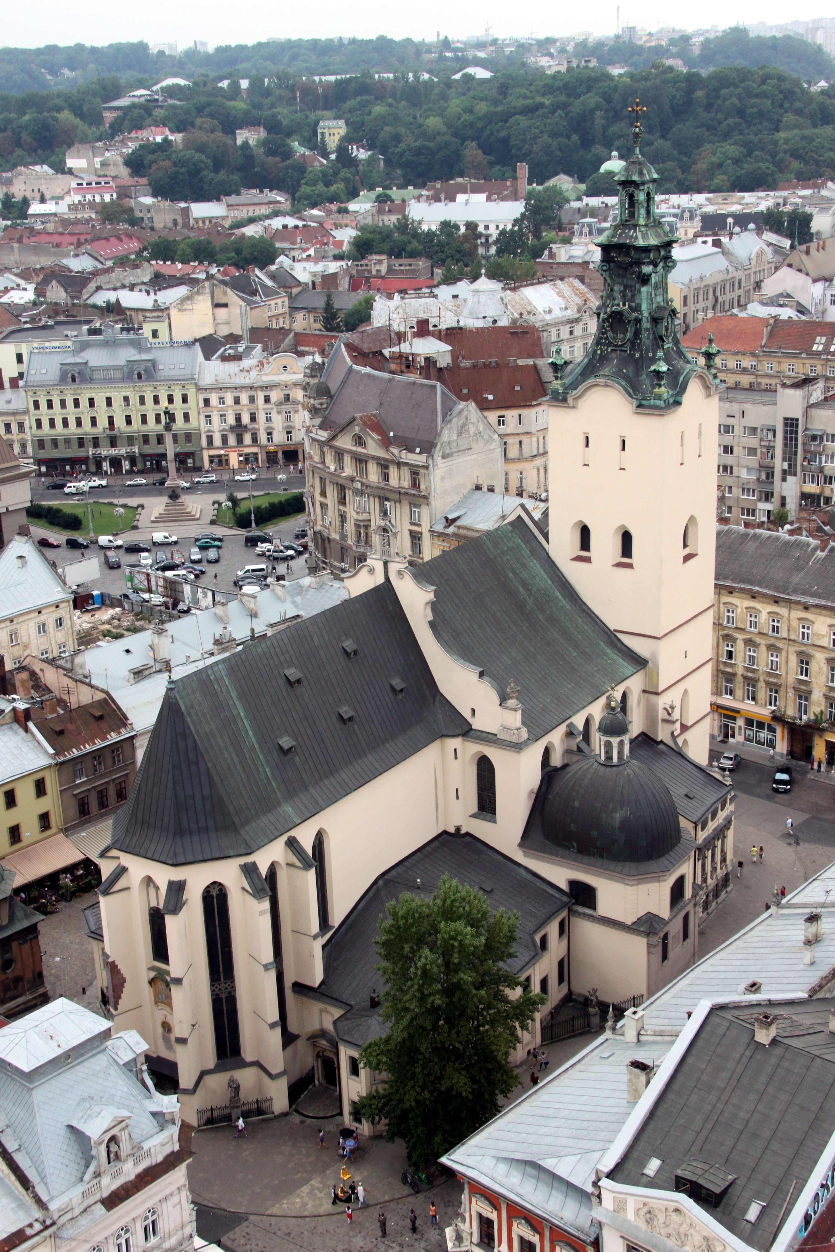 Каплиця Кампіанів, Катедральна пл., 1, Львів